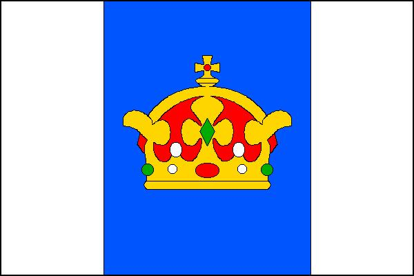 Vlajka obce Krouna